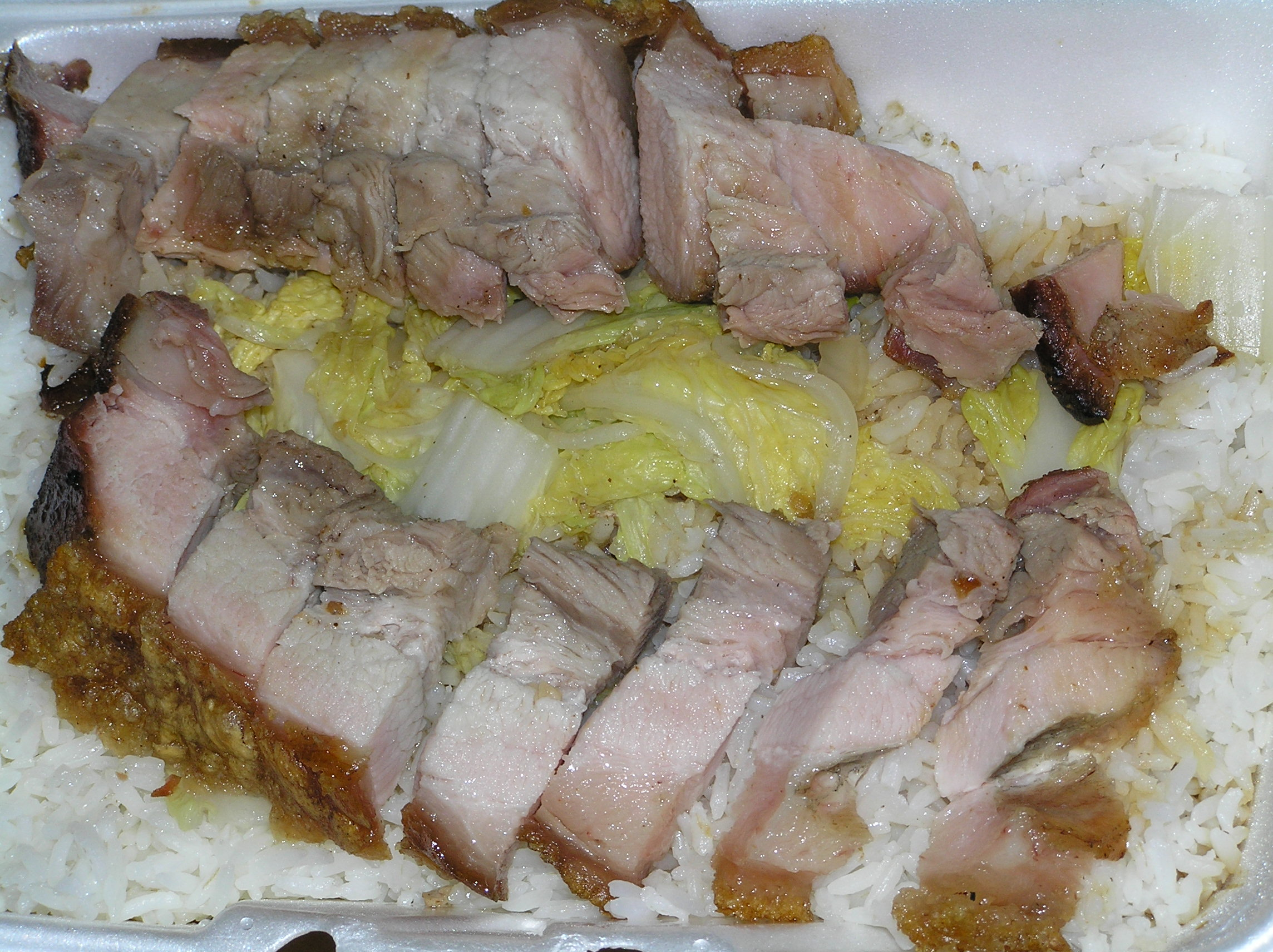 Siu mei meat Siu meat Roasted pork Cantonese cuisine